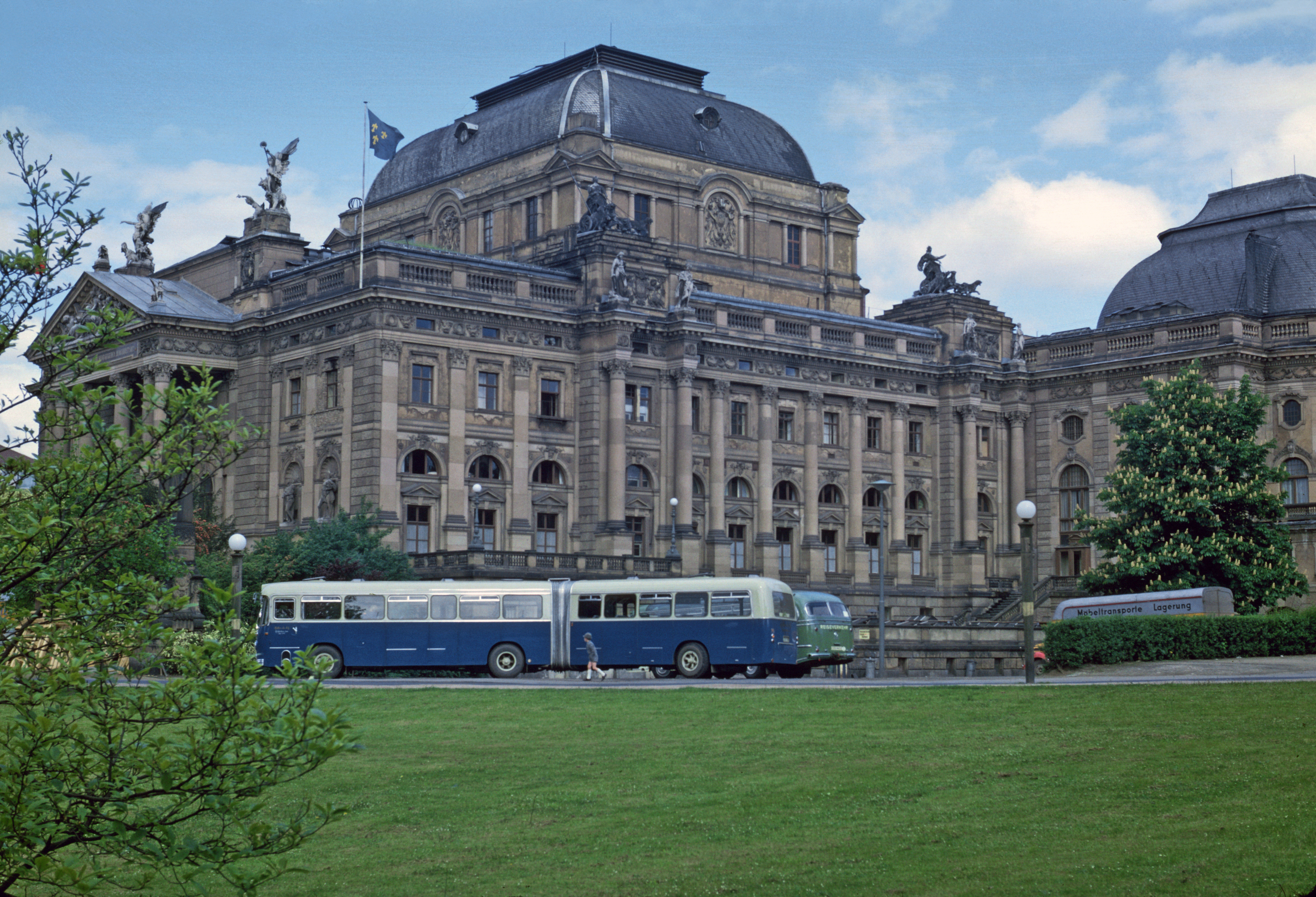 Hessisches Staatstheater Wiesbaden